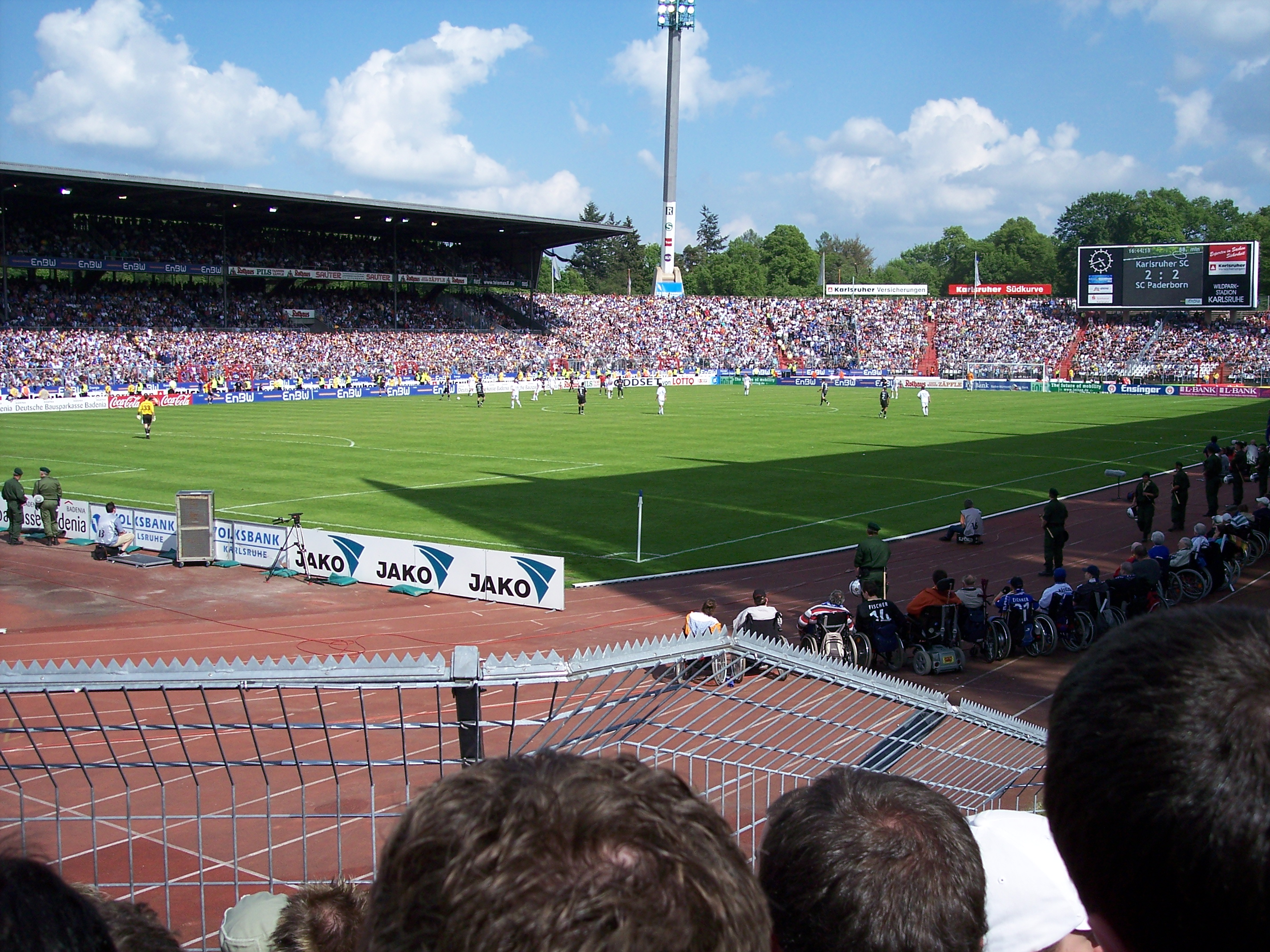 KSC im Wildparkstadion gegen Paderborn (Gegentribüne mit Gästefanblock)